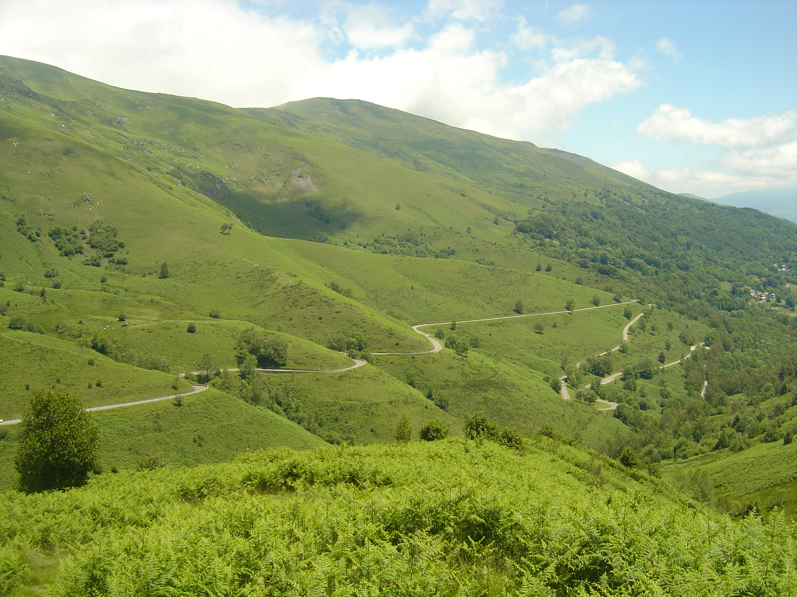 Vue depuis le début du sentier montant au pic d'Estibat sur les 3 derniers kilomètres de l'ascension du col de Port par son versant Est. Le final se fait avec des champs de fougères autour de la route. Plus haut au centre le Serrat de la Pelade (1701m). C'est bien le versant Est contrairement à ce qu'indique le titre du fichier !